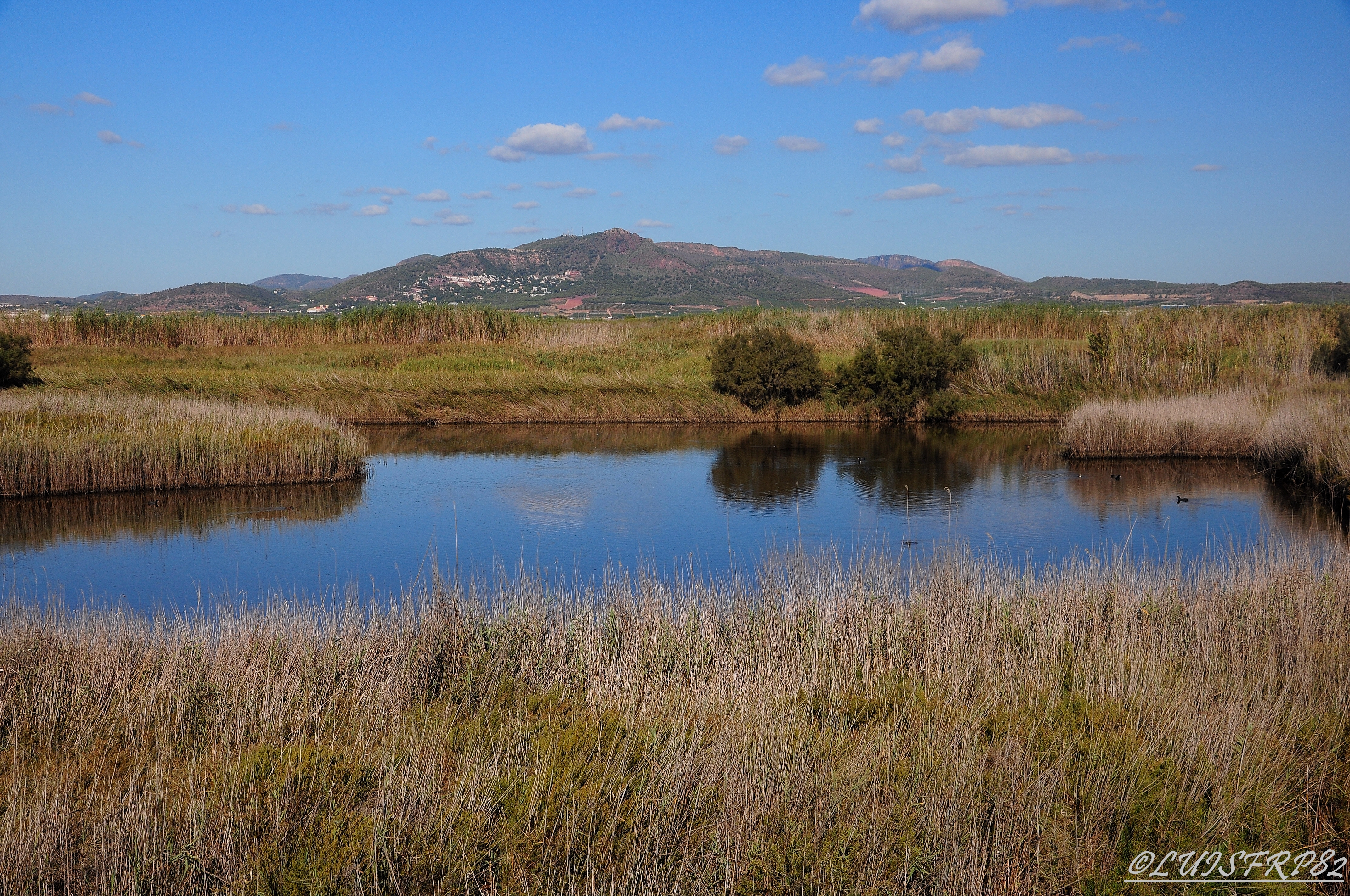 una laguna y el picayo de fondo